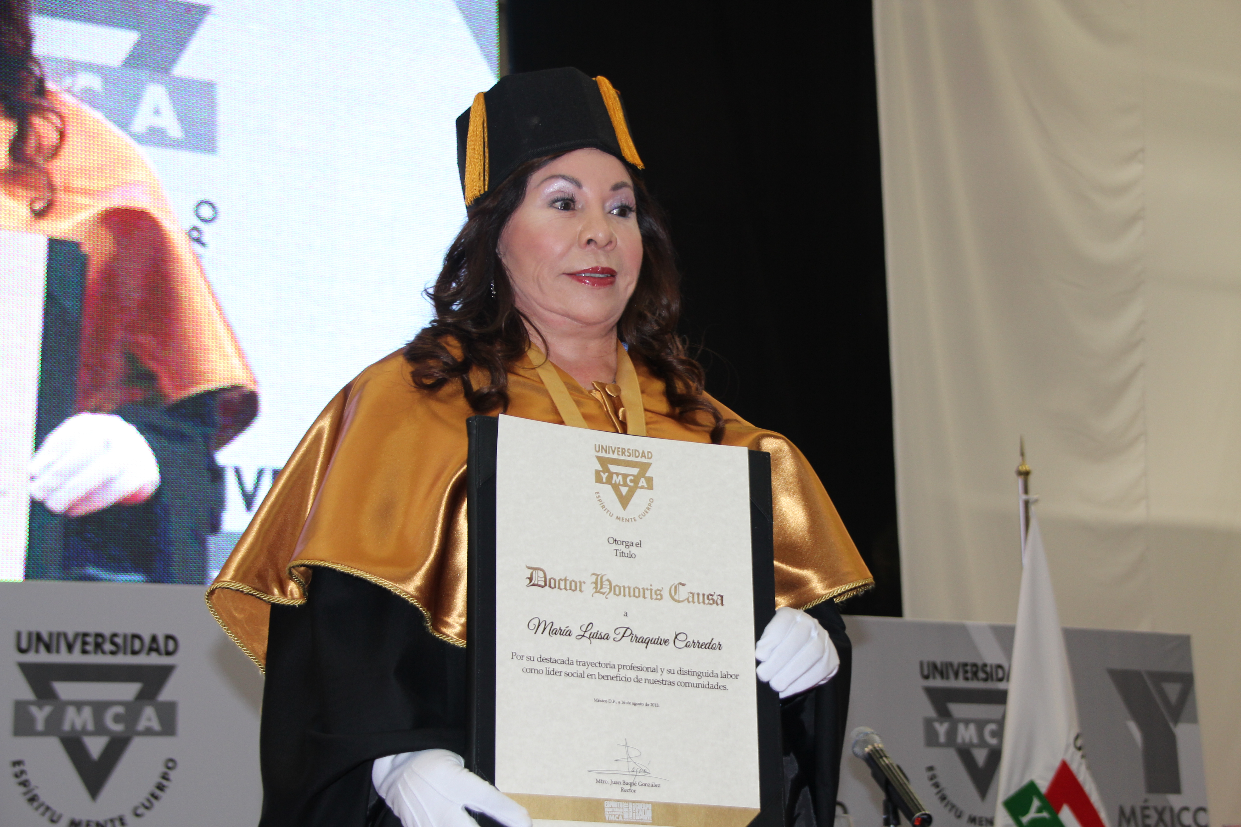 María Luisa Piraquive, Doctorado Honoris Causa.